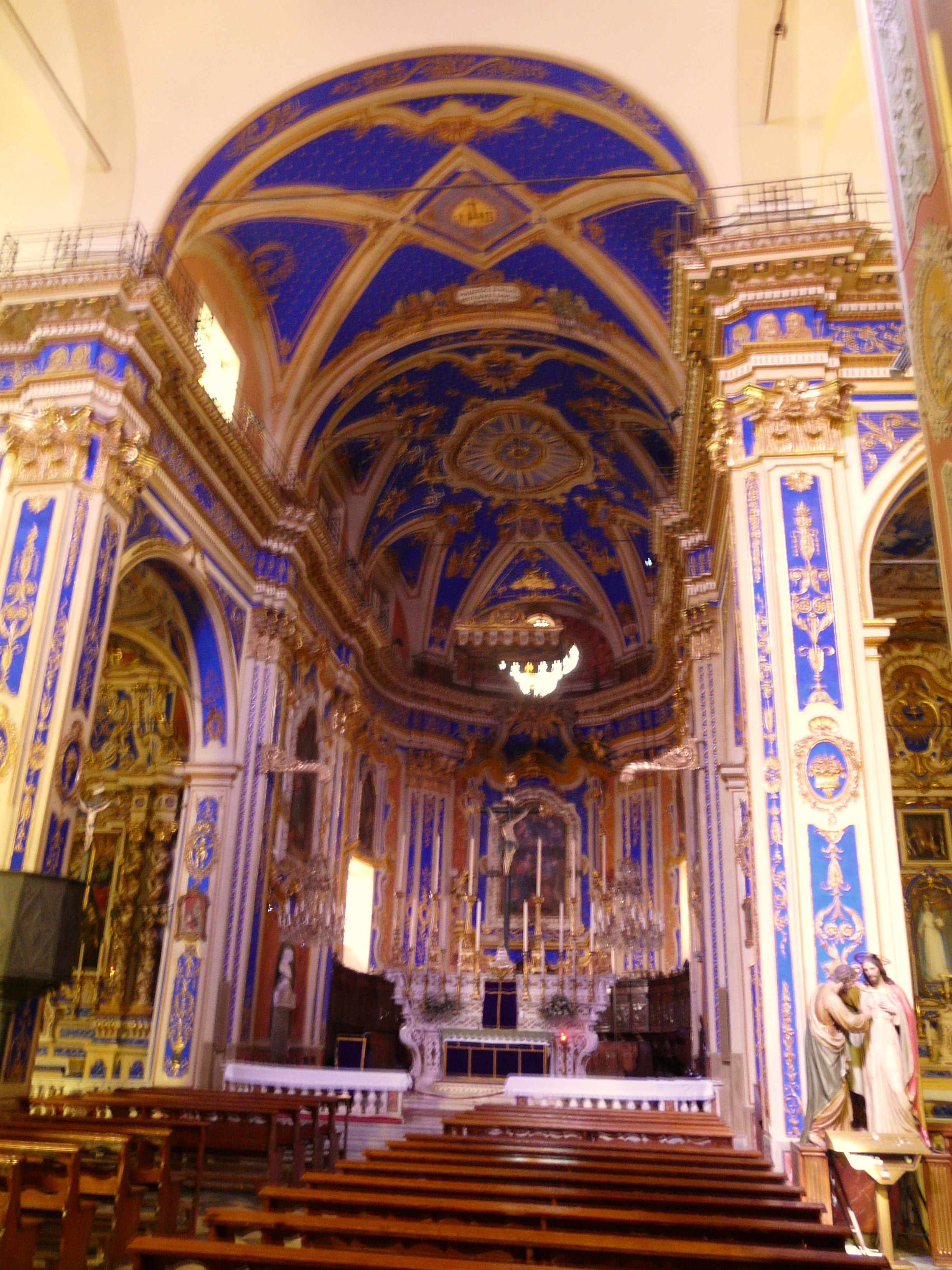 Chiesa di San Tommaso, Dolcedo, Liguria, Italia